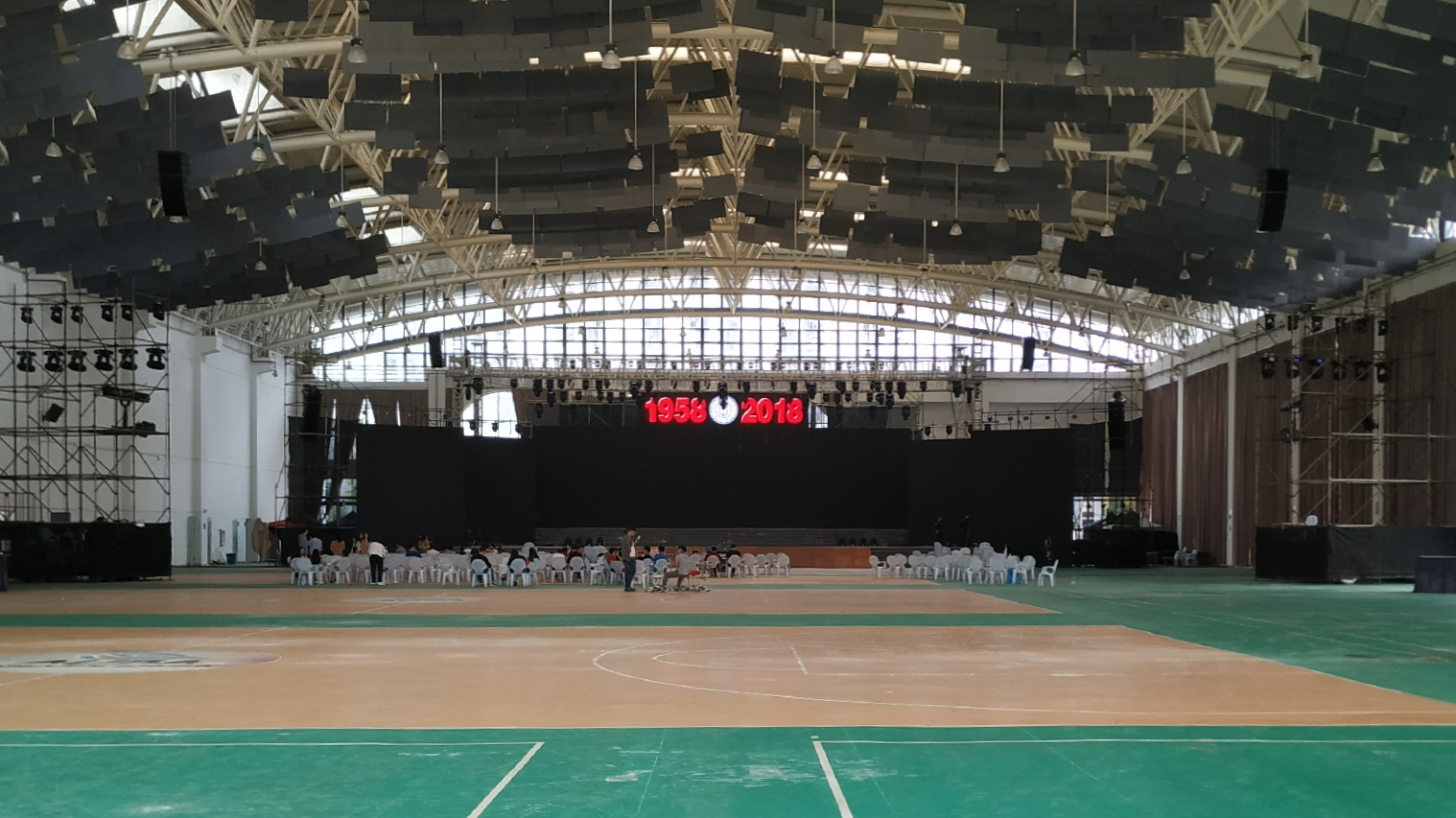 图为闽江学院体育馆内景。闽江学院60周年校庆即将在这里隆重举行。